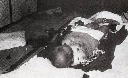 二・二六事件で惨殺された渡辺錠太郎の死体。